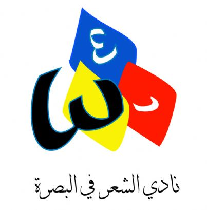 شعار نادي الشعر في البصرة من تصميم الفنان العراقي صدام الجميلي